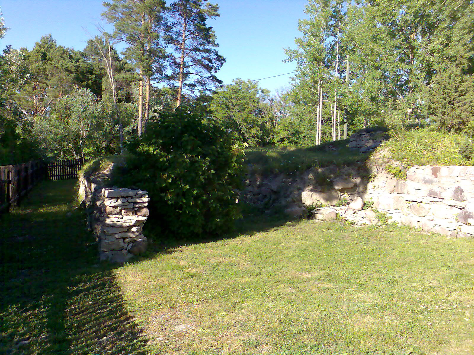 Kassari mõisa peahoone varemed